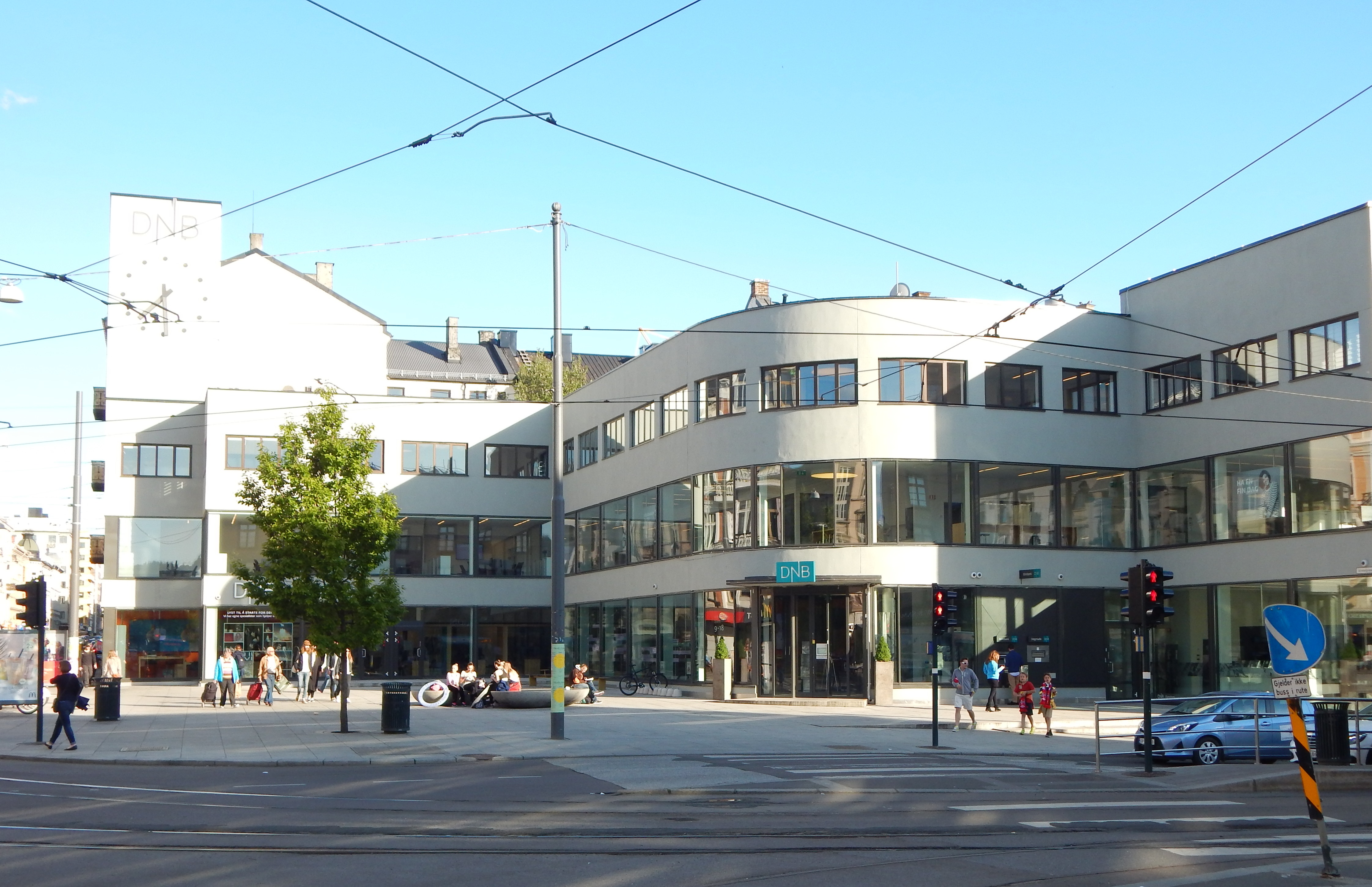 Vinkelplassen med Vinkelgården (Kirkeveien 59)